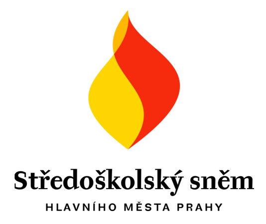 Logo Středoškolského sněmu hlavního města Prahy